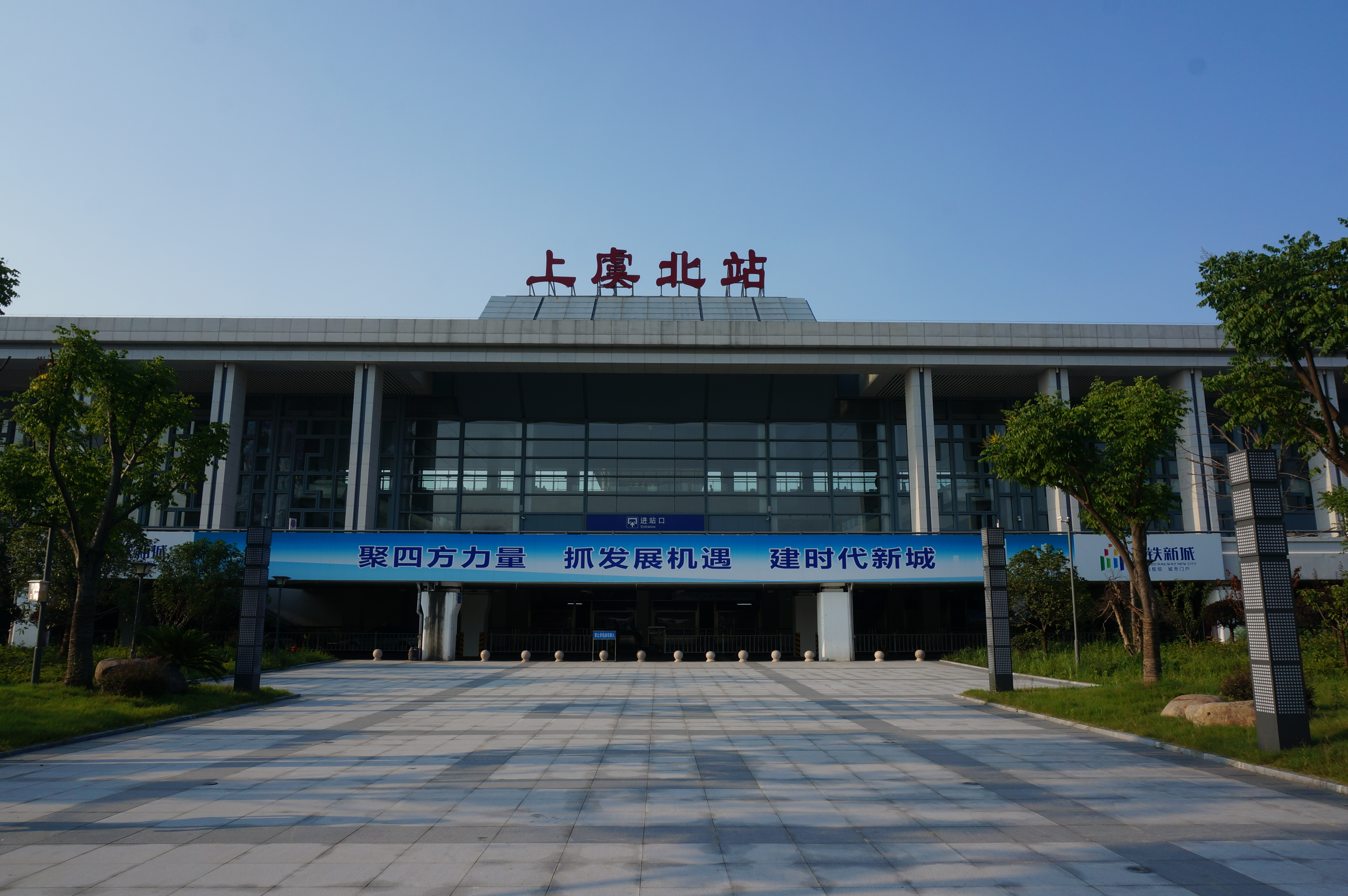 绍兴上虞北站，站房正面。